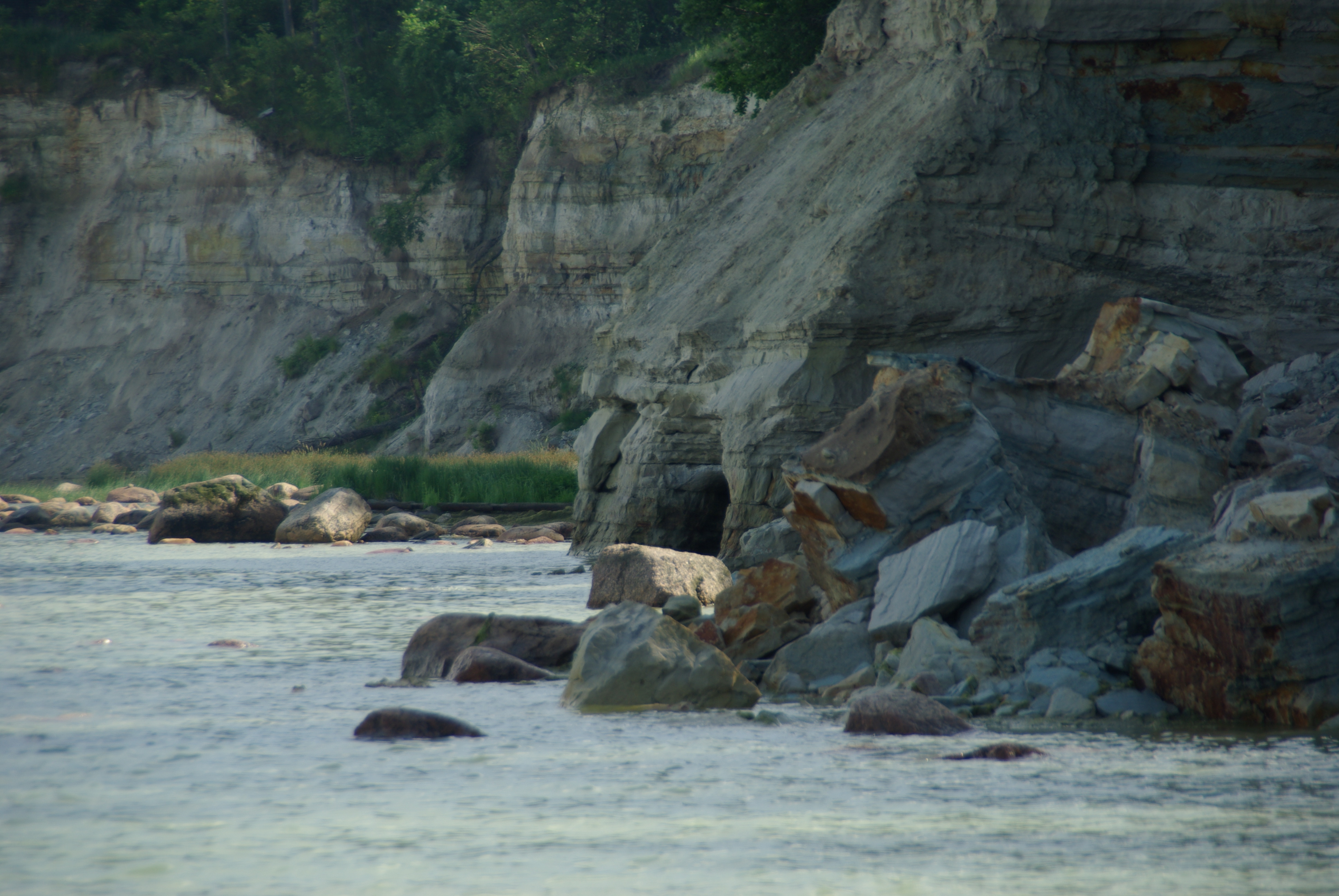 Tilgu koopad jäävad Rannamõisa maastikukaitse alale